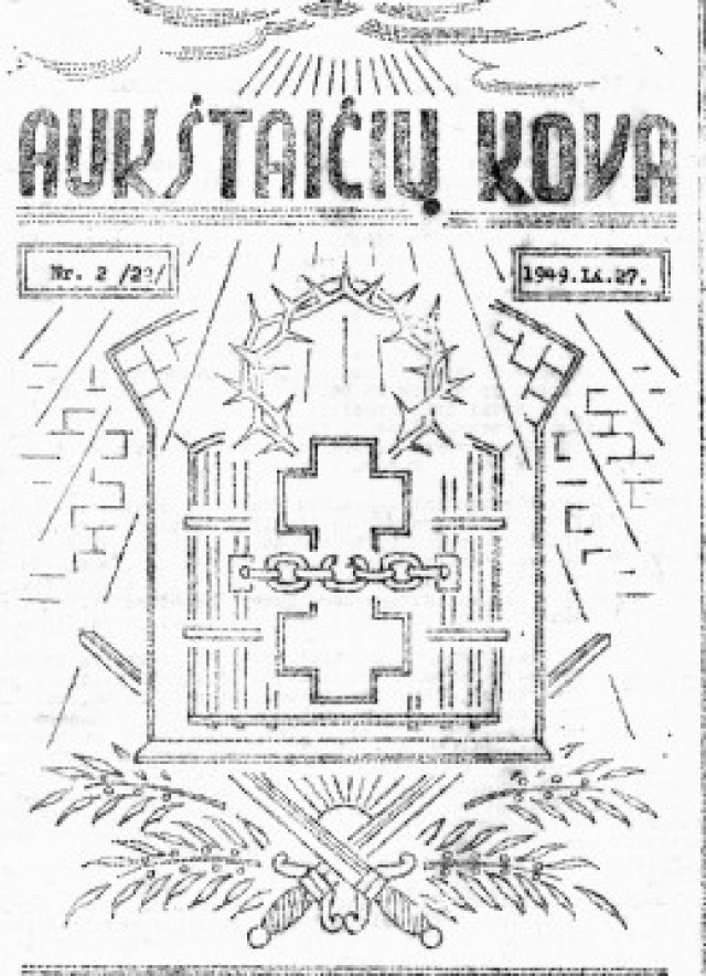 LLKS Rytų Lietuvos (Karaliaus Mindaugo) srities partizanų leidinys Aukštaičių kova. (Genocido aukų muziejus) 1